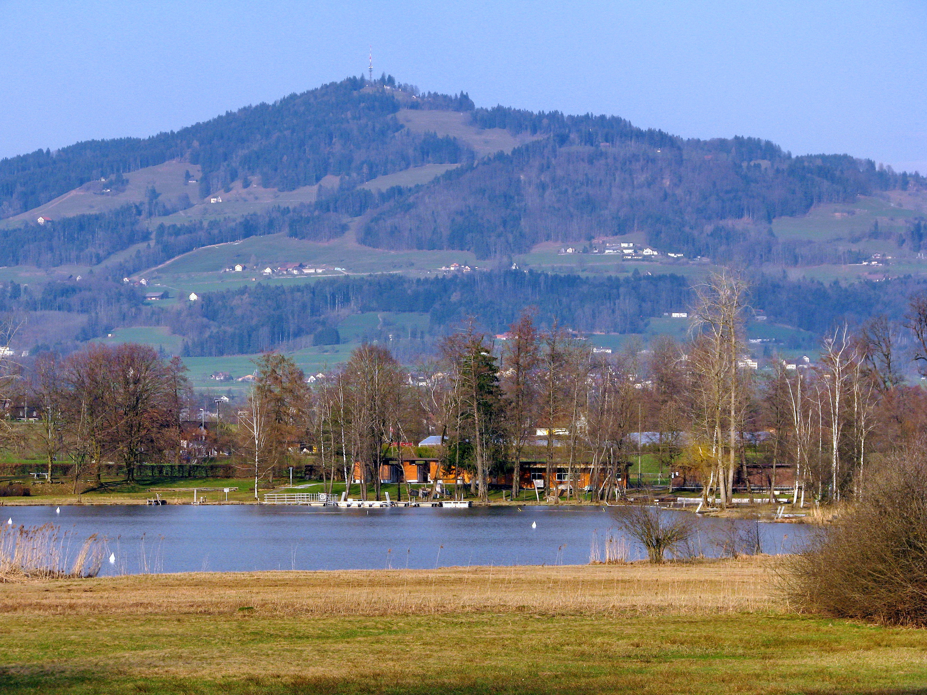 Bachtel and Egelsee as seen from Widerzell in Bubikon (Switzerland)